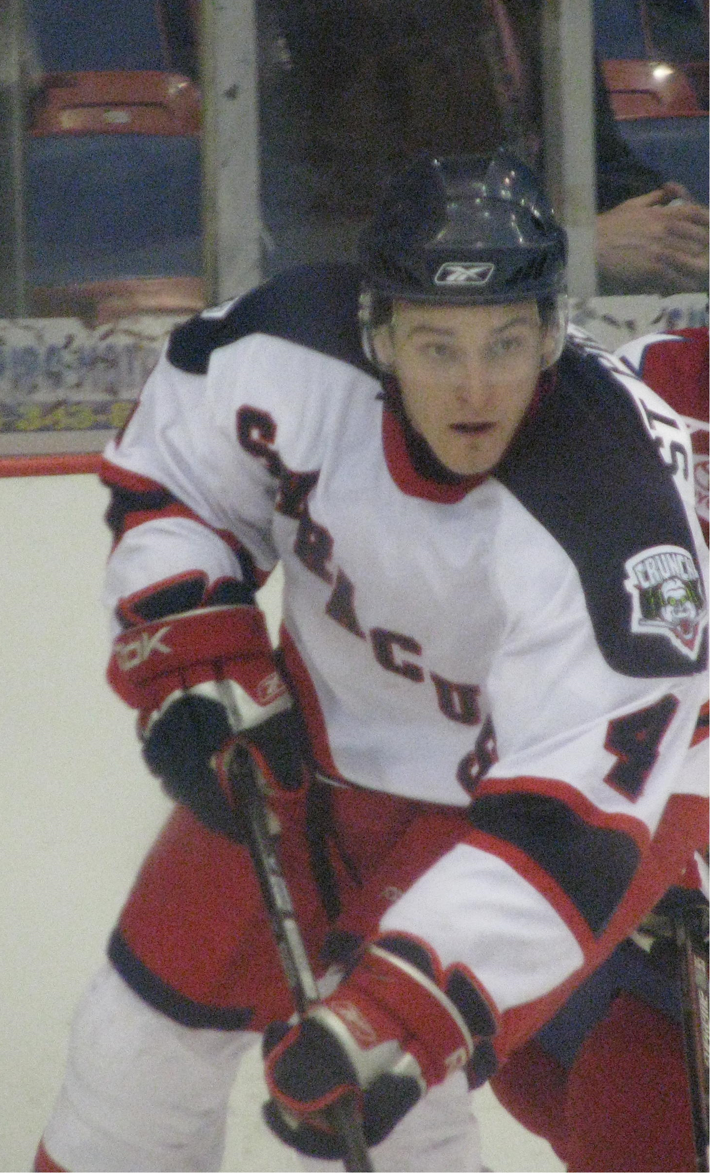 Nick St. Pierre im Trikot der Syracuse Crunch